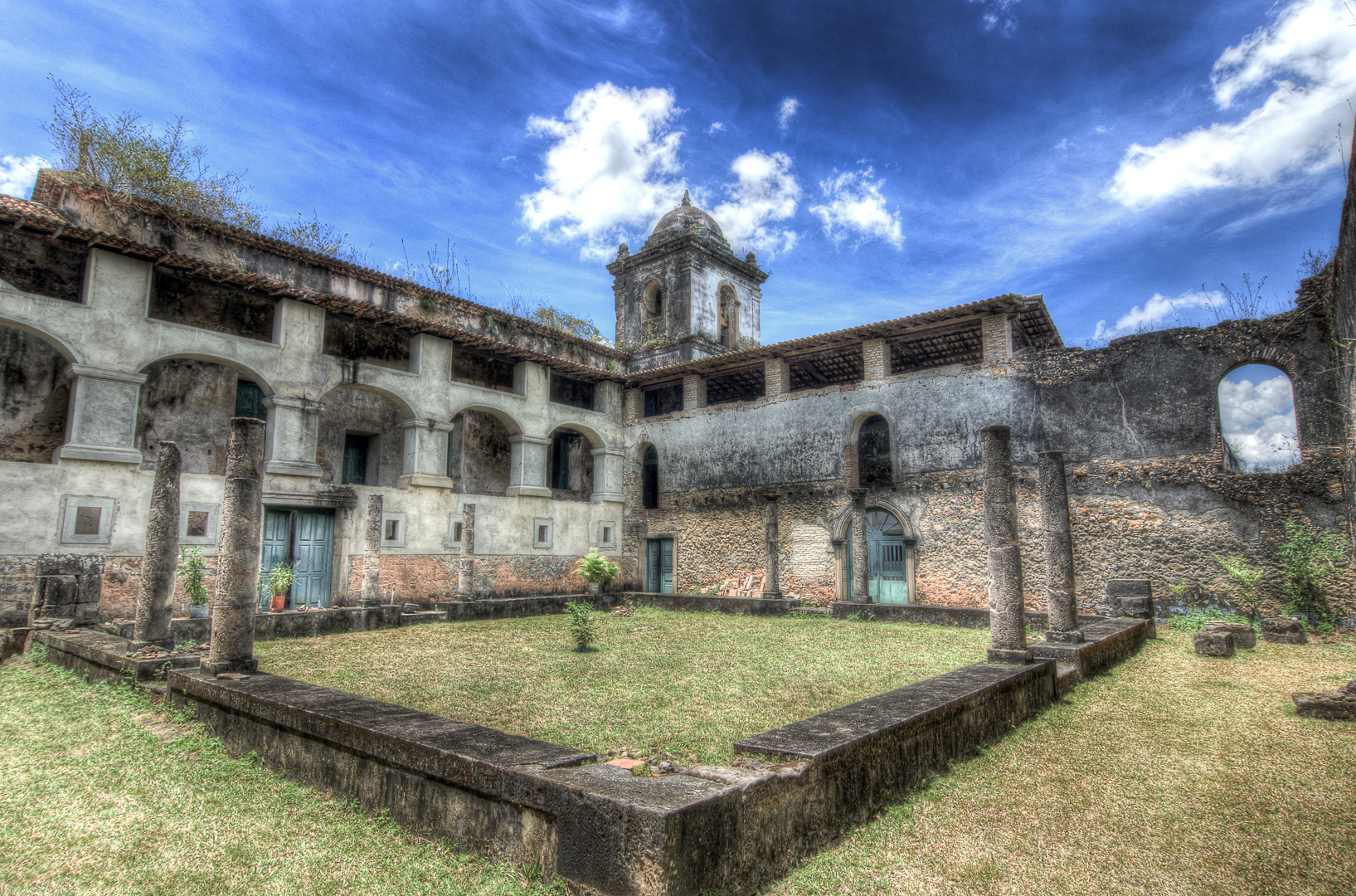 Convento de Santo Antônio de Paraguassú: igreja e ruínas